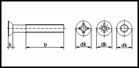 ISO 7046